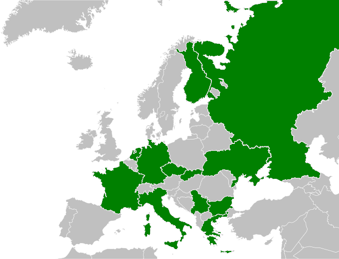 Reprezentacje biorące udział w Mistrzostwach Europy w Piłce Siatkowej Mężczyzn 1997.